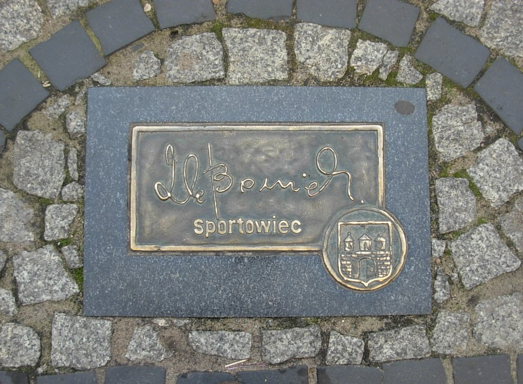 Bydgoska Aleja Autografów - Zbogniew Boniek, 2007